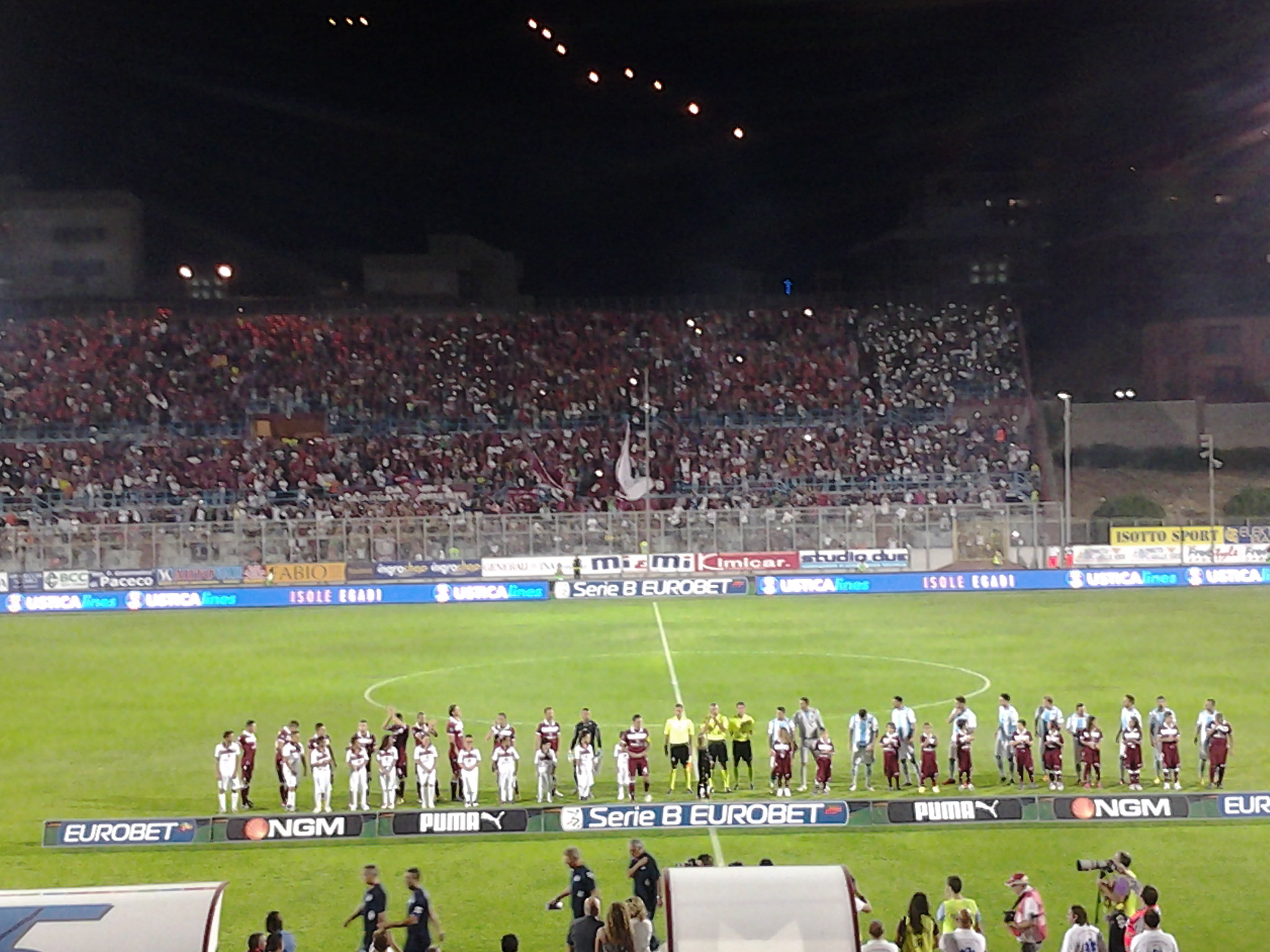 Gara Trapani-Pescara a Trapani per il campionato di serie B. Esordio casalingo dei granata in B